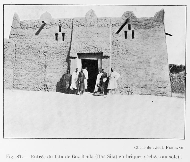 Entrée du tata de Goz Beïda (Dar Sila) en briques séchées au soleil. From L'Afrique Équatoriale Française: le pays, les habitants, la colonisation, les pouvoirs publics. Préf. de M. Merlin. Avec 186 reproductions photographiques, 33 diagrammes, profils, et 7 cartes dont 5 en couleurs, (published 1918)